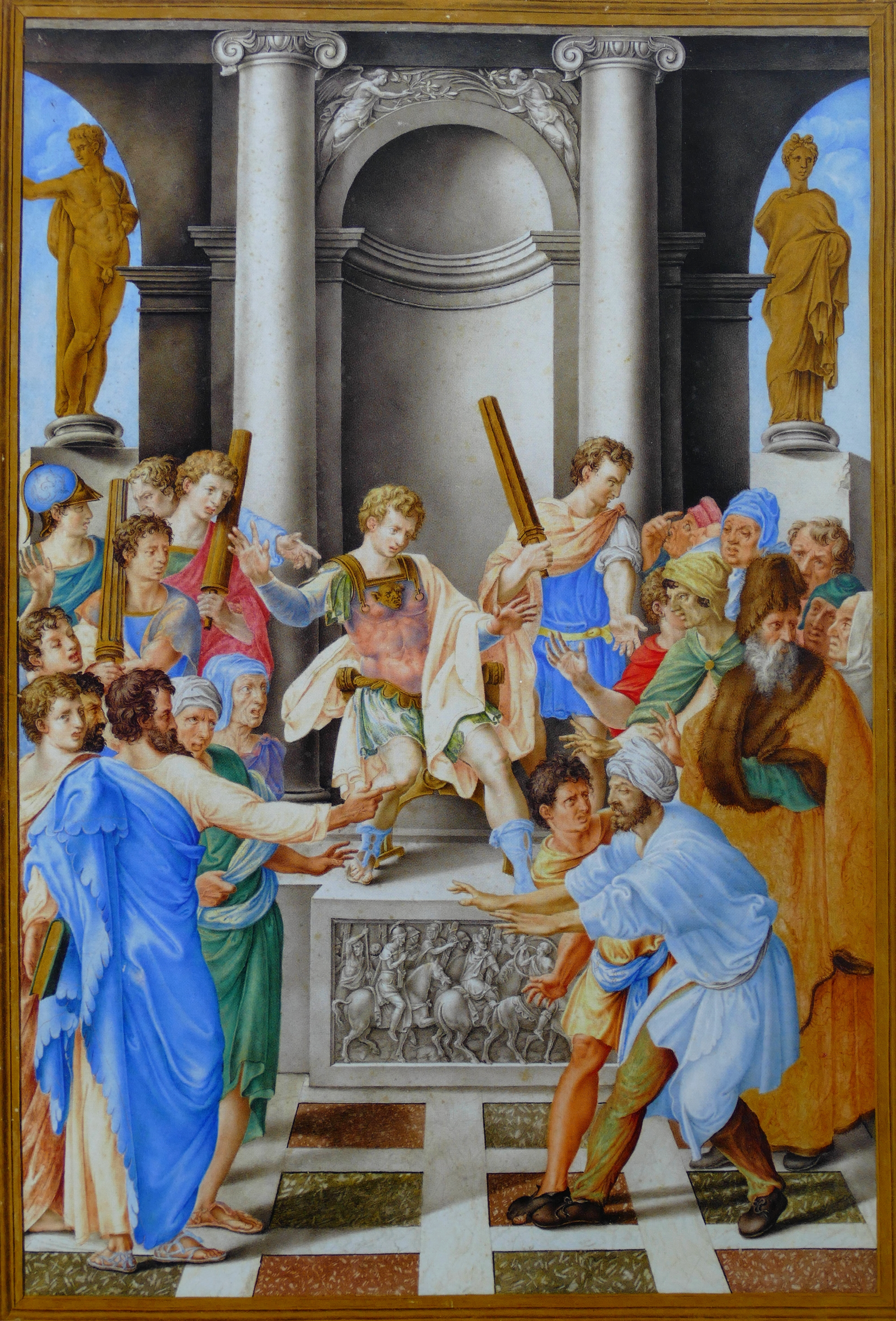 Enluminure 33,5 x 22,8 cm, BnF Cabinet des dessins. RF 3977 - Provenance : Venise 1542.